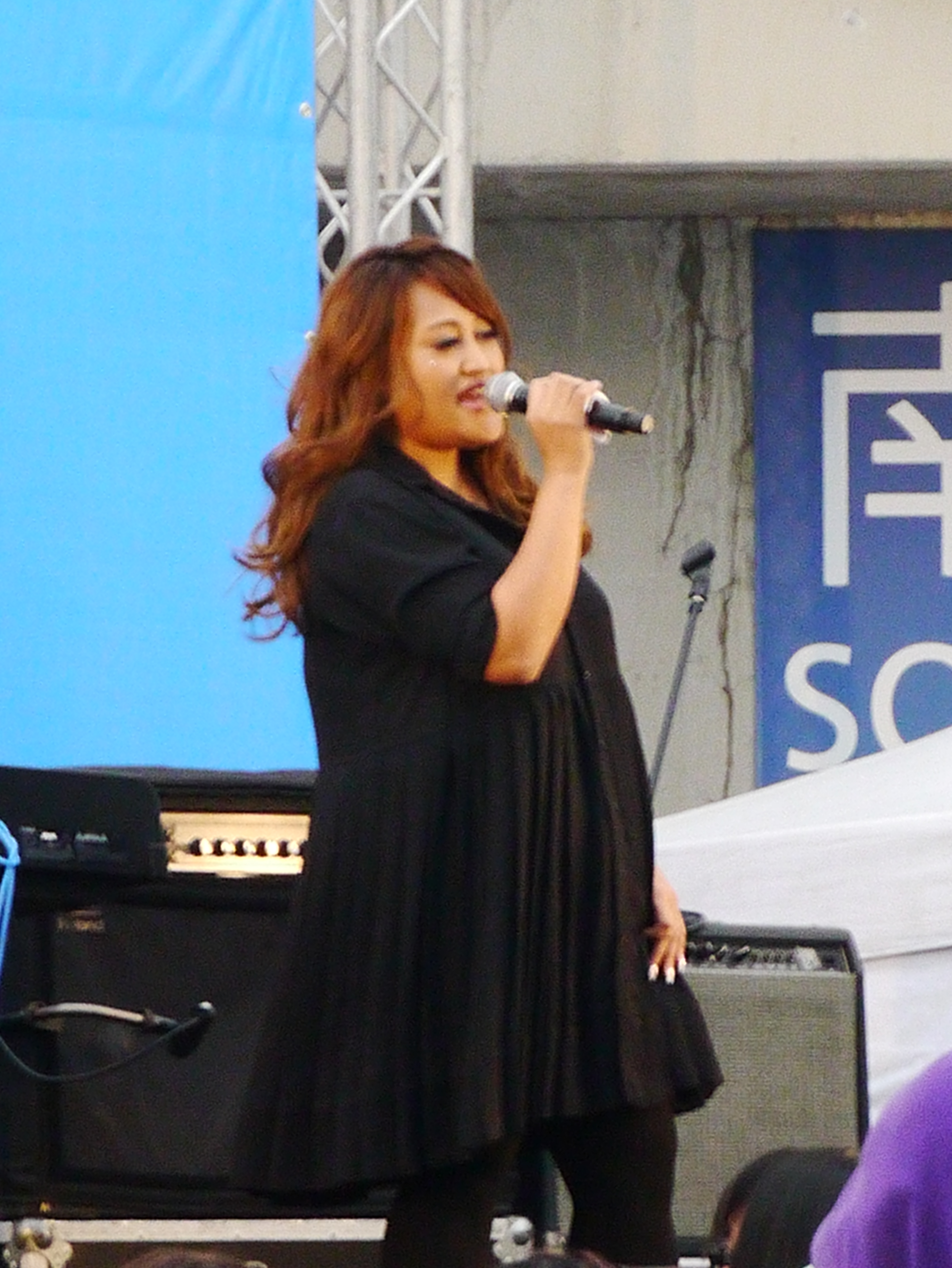 紀家盈(家家)，拍攝於2012/12/30五月天高雄市運場館外